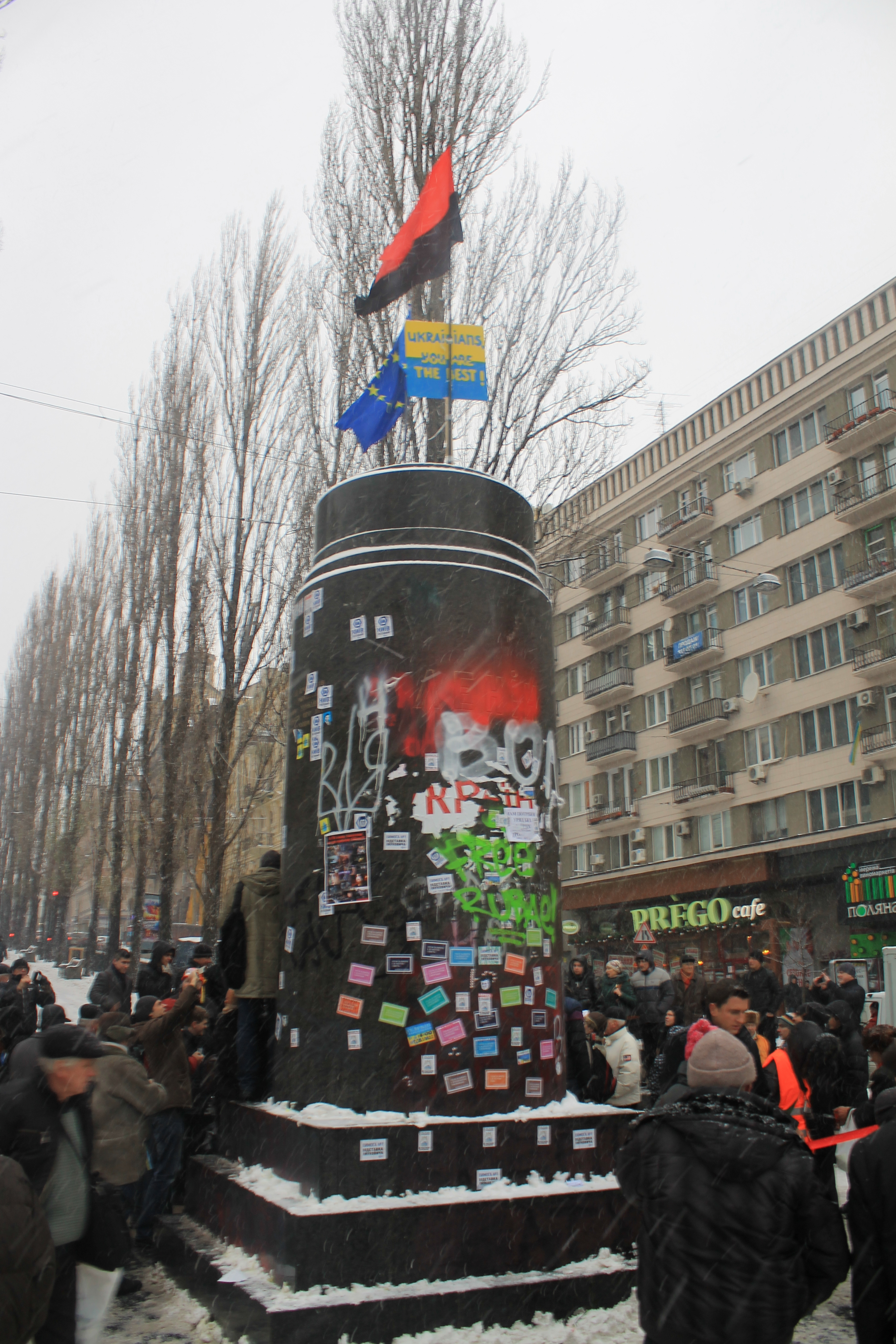 Те що було пам'ятником Леніну, 9 грудня 2013